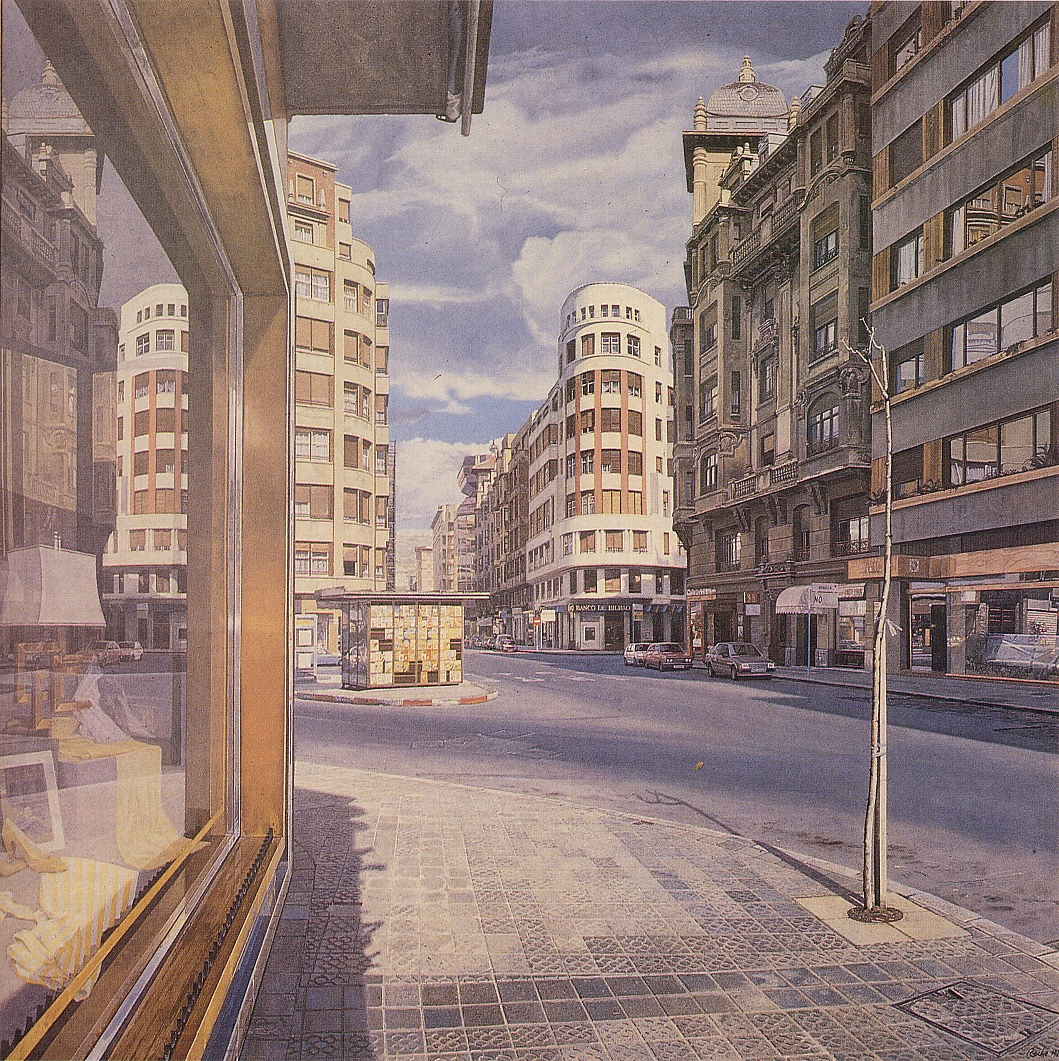 Ercilla cruce con Licenciado Poza hacia la Plaza Moyua.